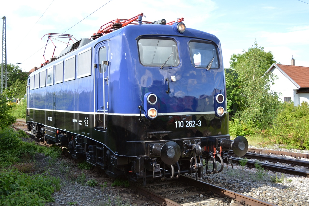 Lok DB-Baureihe 139 - 139 262–0 als 110 262-3 im Eisenbahnmuseum Nördlingen, 2018